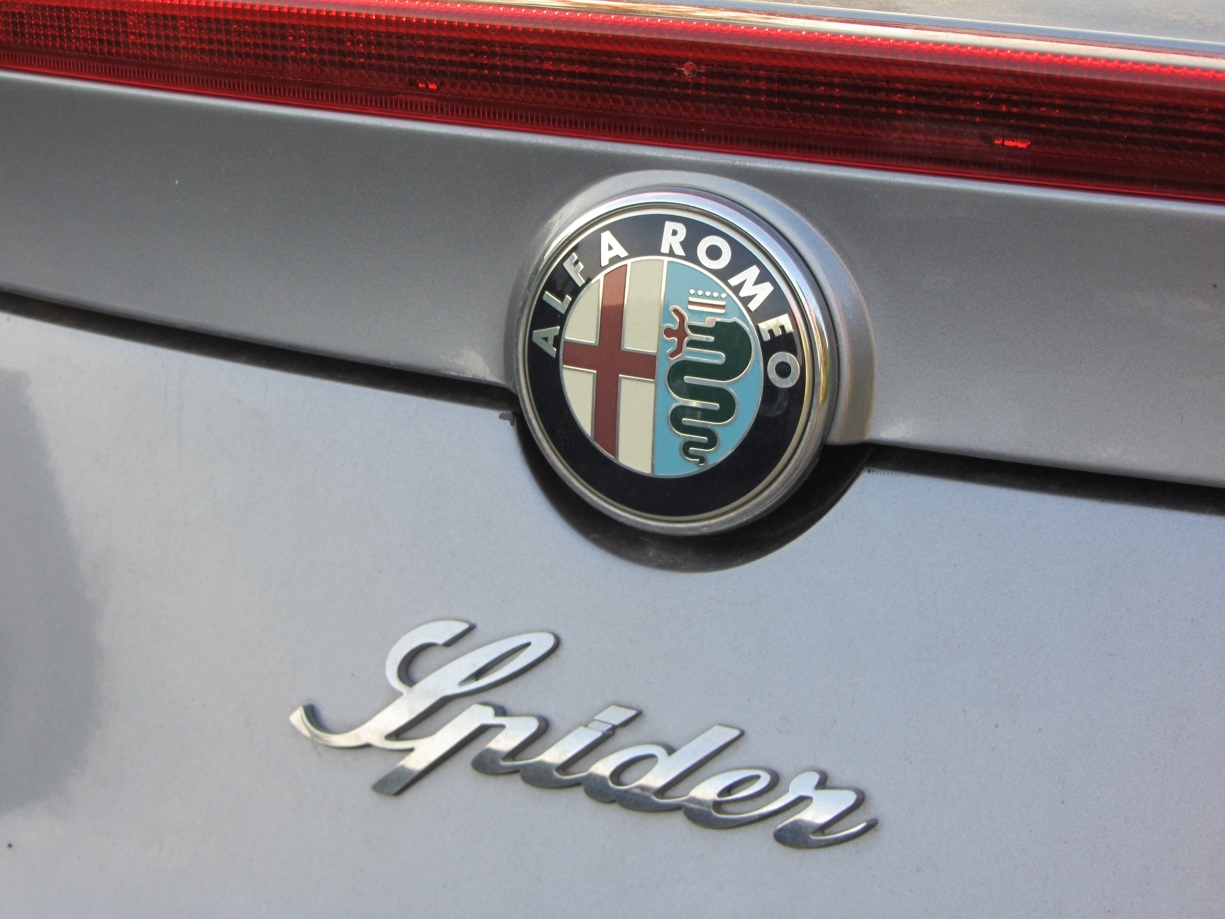 logo Alfa e Spider con faro di stop di una Alfa Romeo Spider del 2006 a Porto Recanati